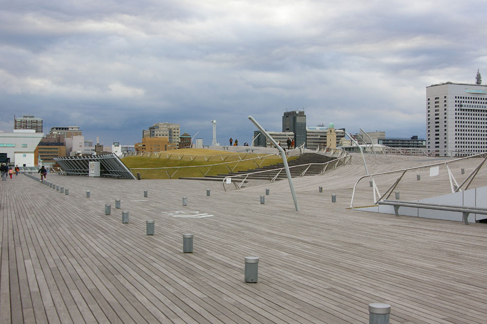 Osanbashi, Yokohama, Japan